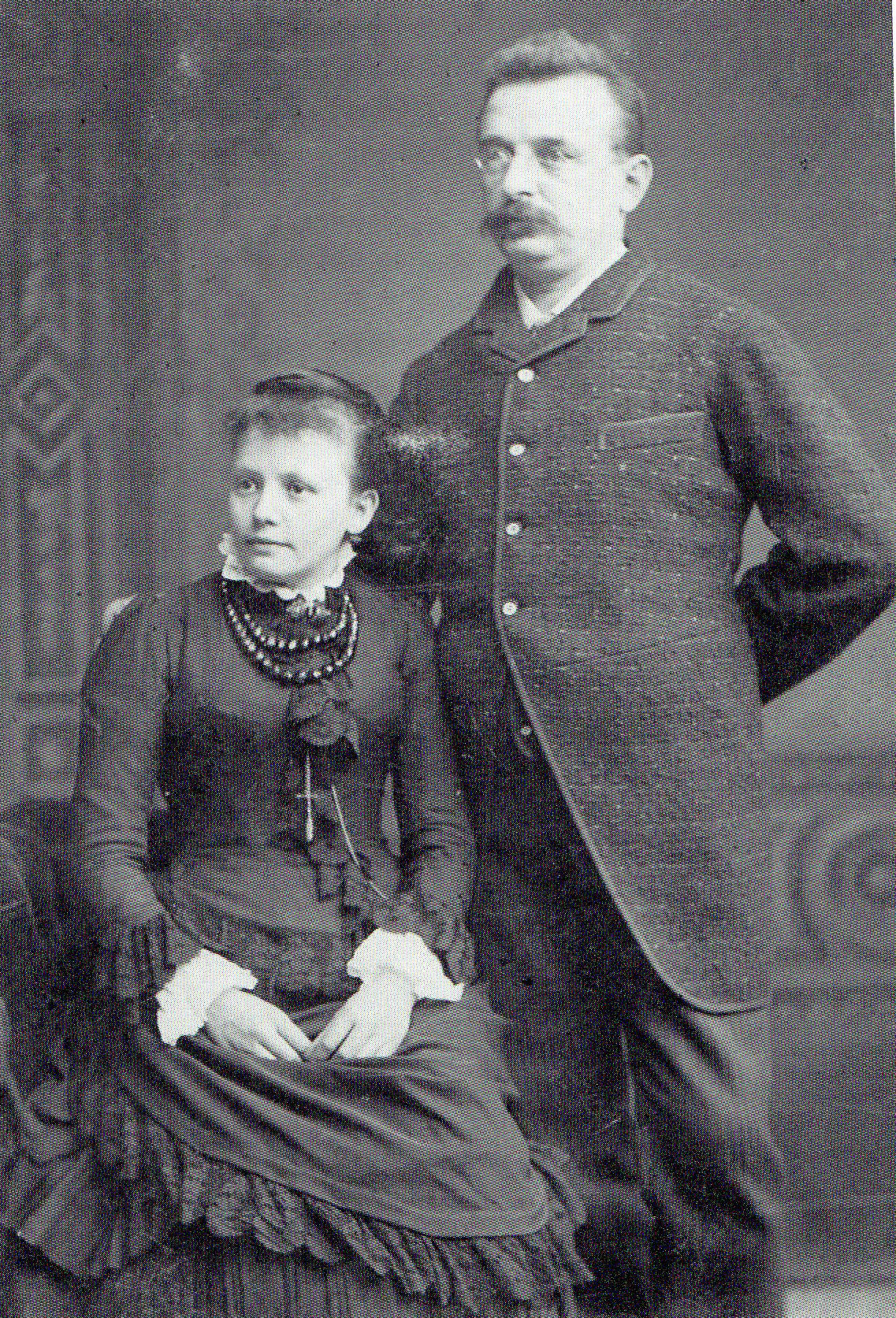 Karl Liebhardt und seine Ehefrau Bertha geb. Traub